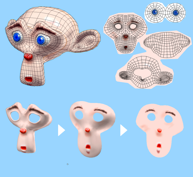 การสร้าง UV แบบอัตโนมัติด้วยอัลกอริธึมแบบ LSCM